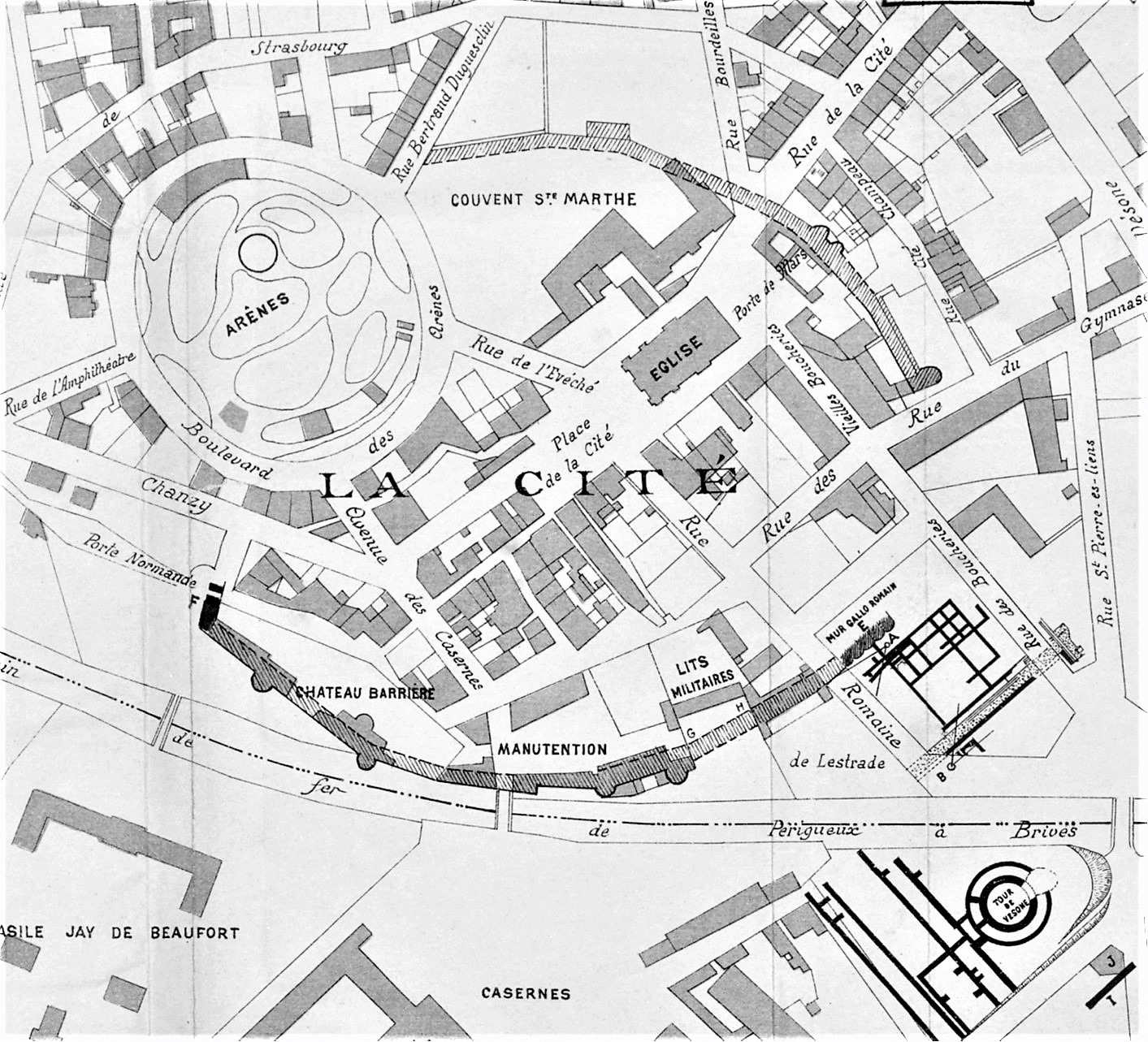 Plan des fouilles de Vésone en 1906